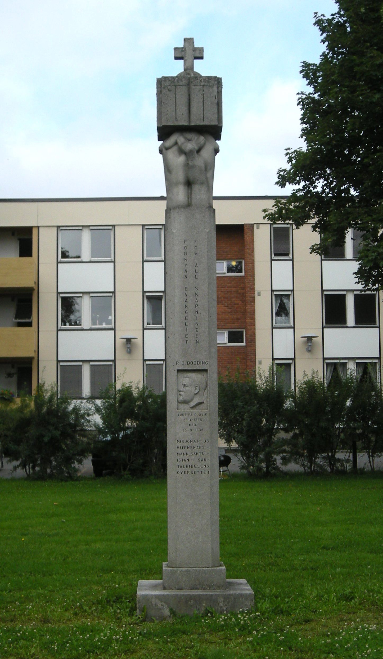 Monument over Paul Olaf Bodding utenfor Gjøvik kirke